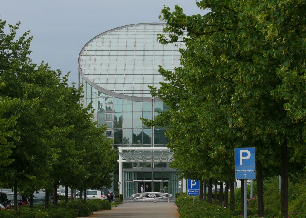 GEA Hauptverwaltung.